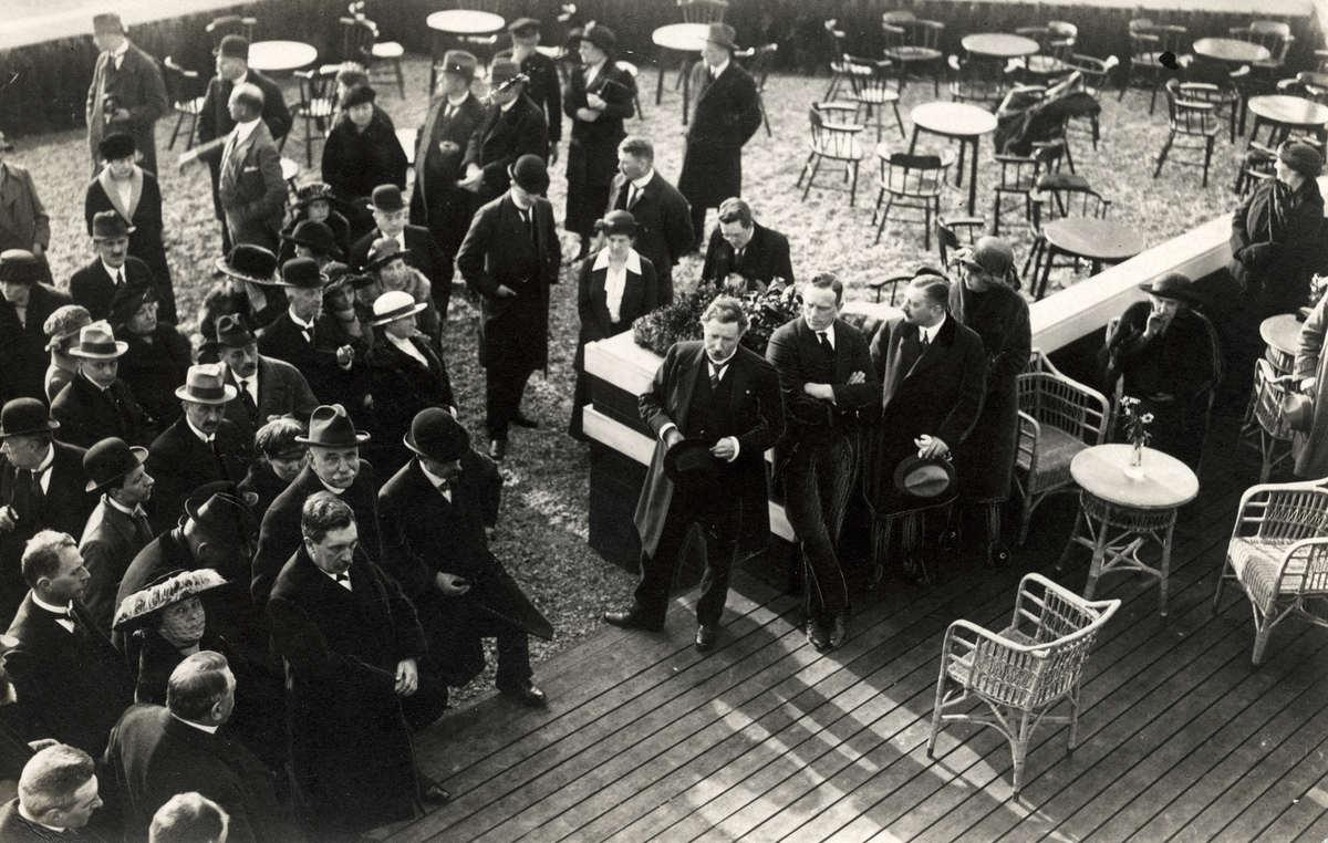 Toespraak van Burgdorffer, directeur van gemeente werken van Rotterdam bij de opening van het hotel-café van de "Waalhaven", het vliegveld.